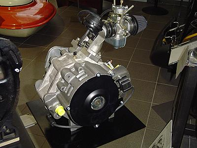 Kart Wankelmotor der Firma Aixro Aachen